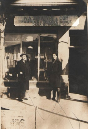 Hapja e fabrikes se pare e Trikotazhit ne Korce